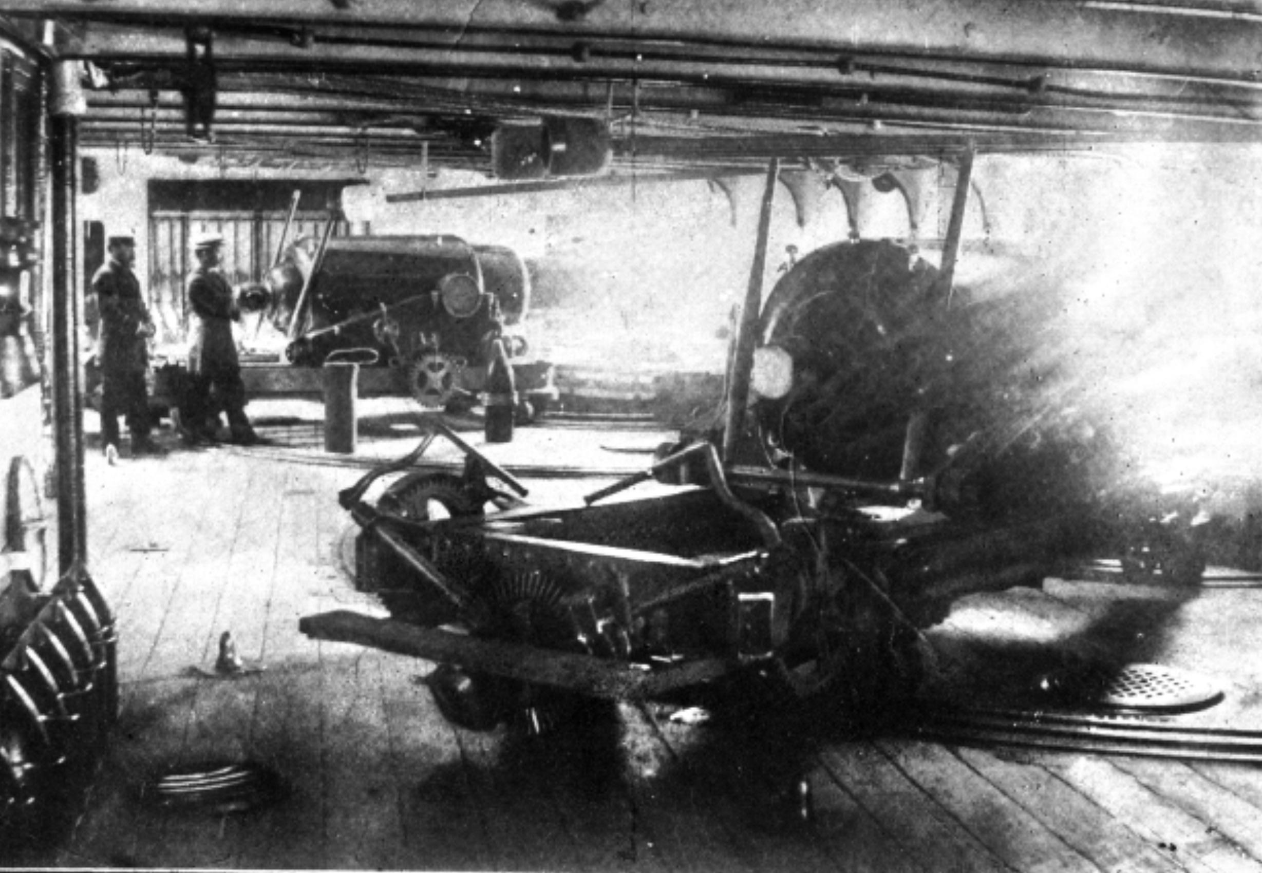 Bateria central de la fragata blindada cochrane